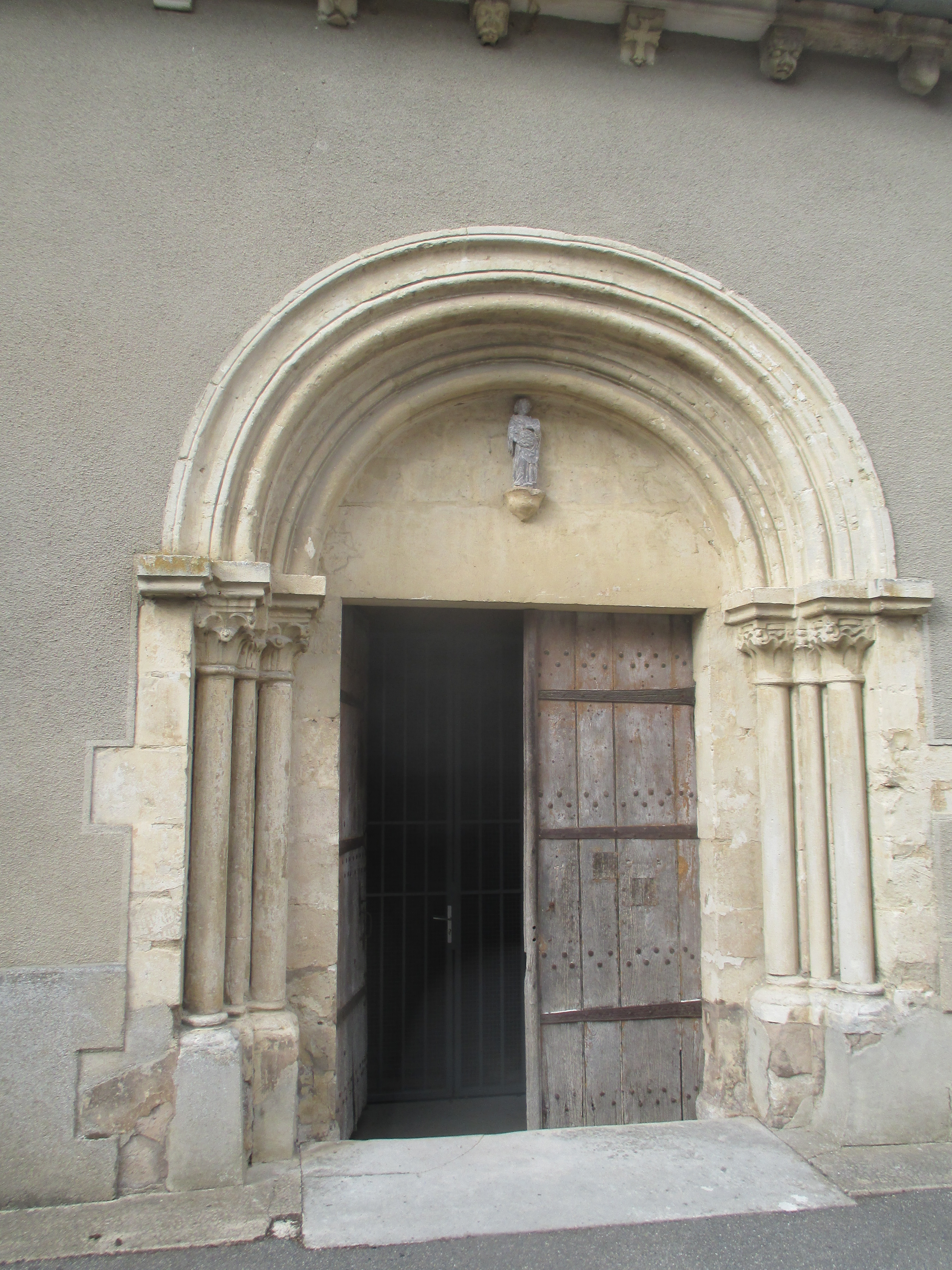 Portail d'entrée de l'église de Cerisiers (Yonne).